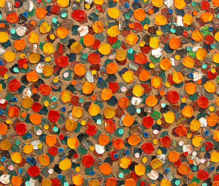 Peinture réalisée par l'artiste Achot Achot.